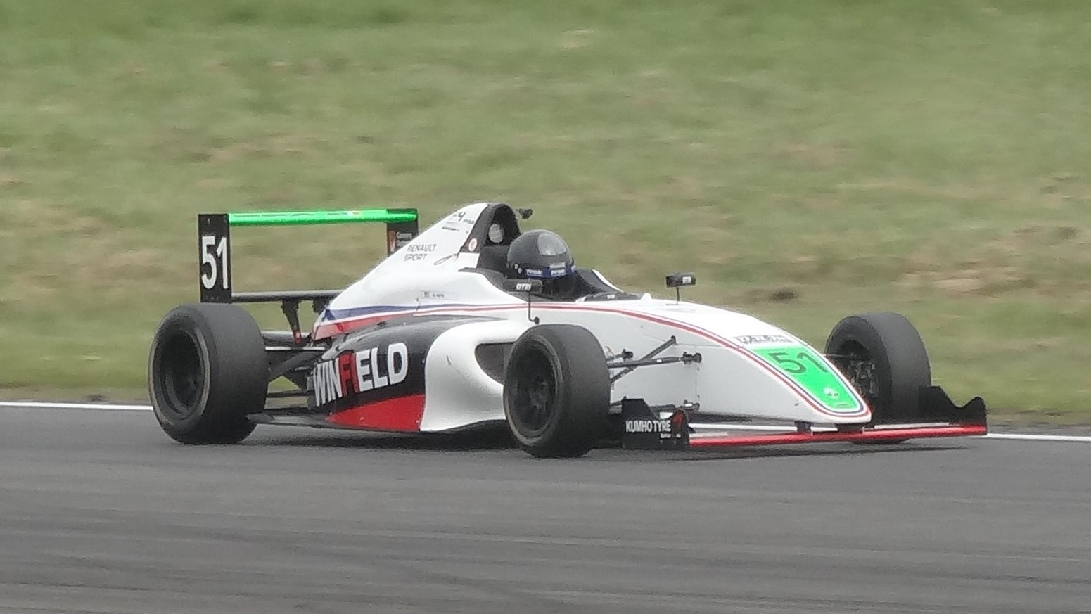 52e Coupes de Pâques (sport automobile), sur le Circuit Paul Armagnac à Nogaro (Gers) : F4 France - Nicky Hays durant la course 3.